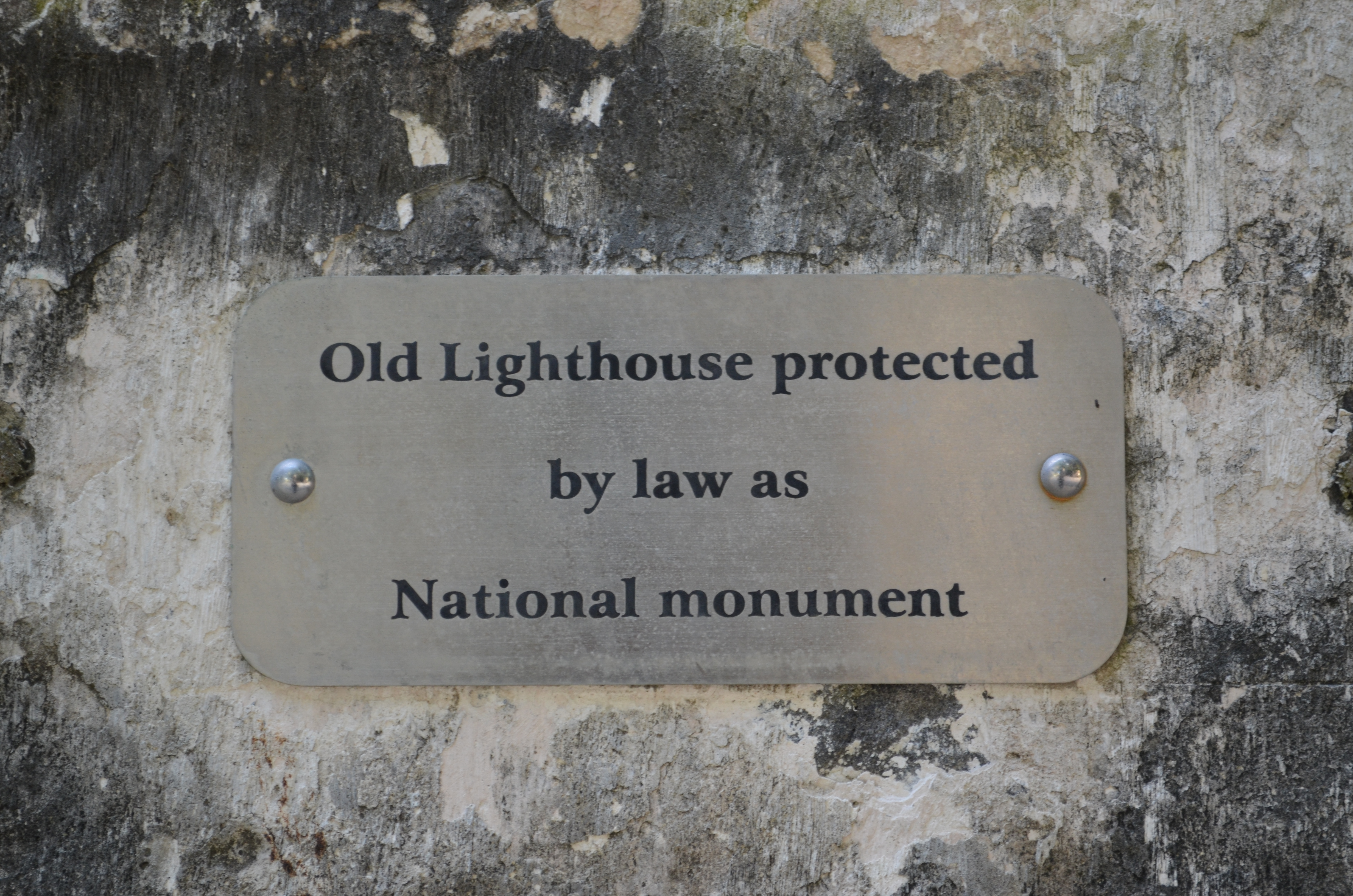 Pointe aux Canonniers, Lighthouse, cultural heritage monuments